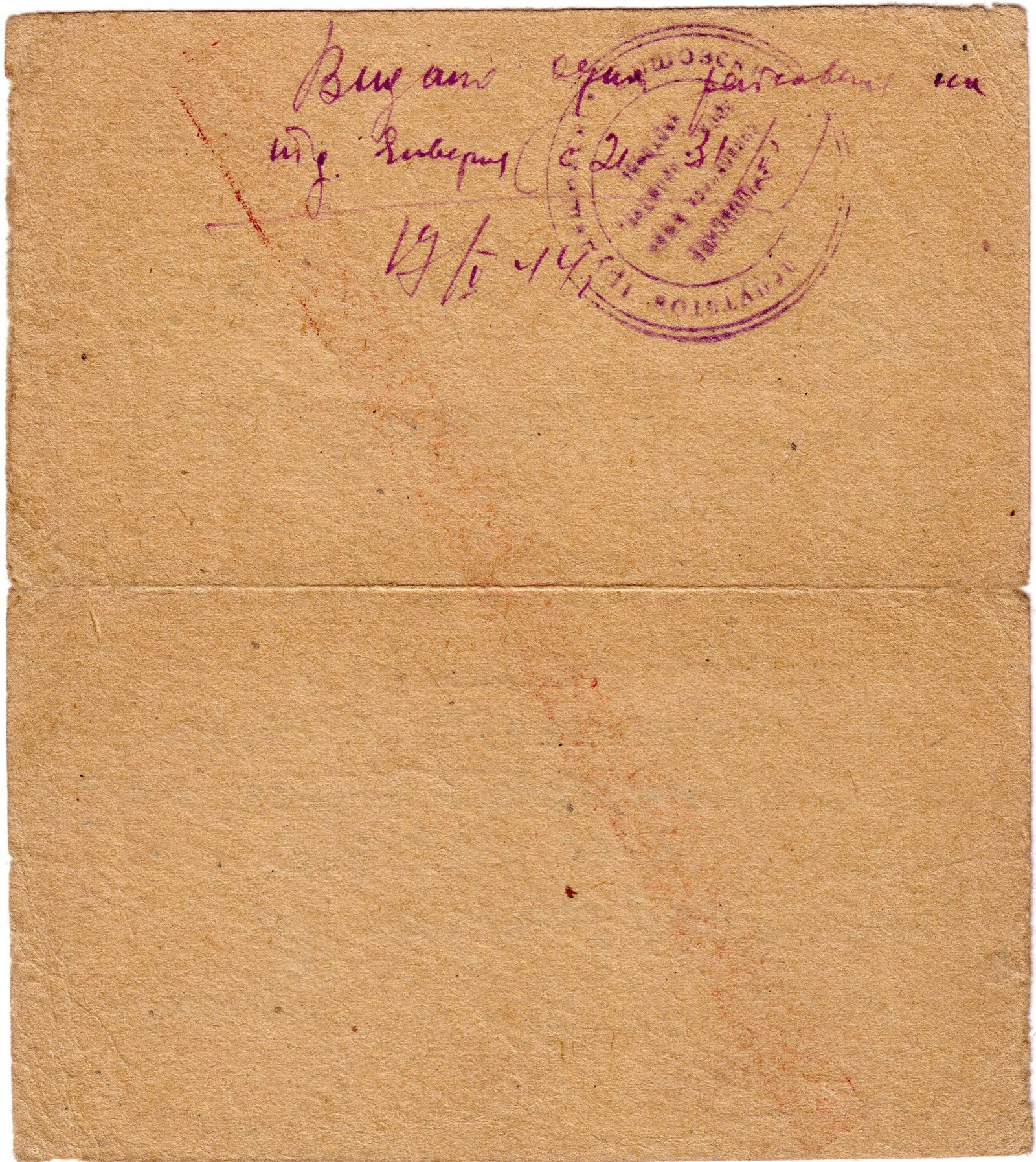 Ершов. Отметка о выдаче прод. пайка Ершовским Советом депутатов трудящихся на десять суток (21 - 31 января) на обратной стороне пропуска. Печать. 1944